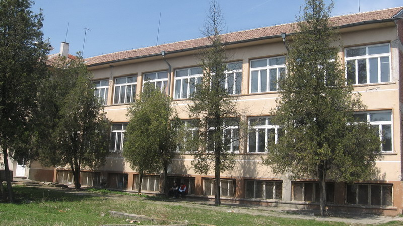 Училище "Кирил и Методий", село Млекарево, България